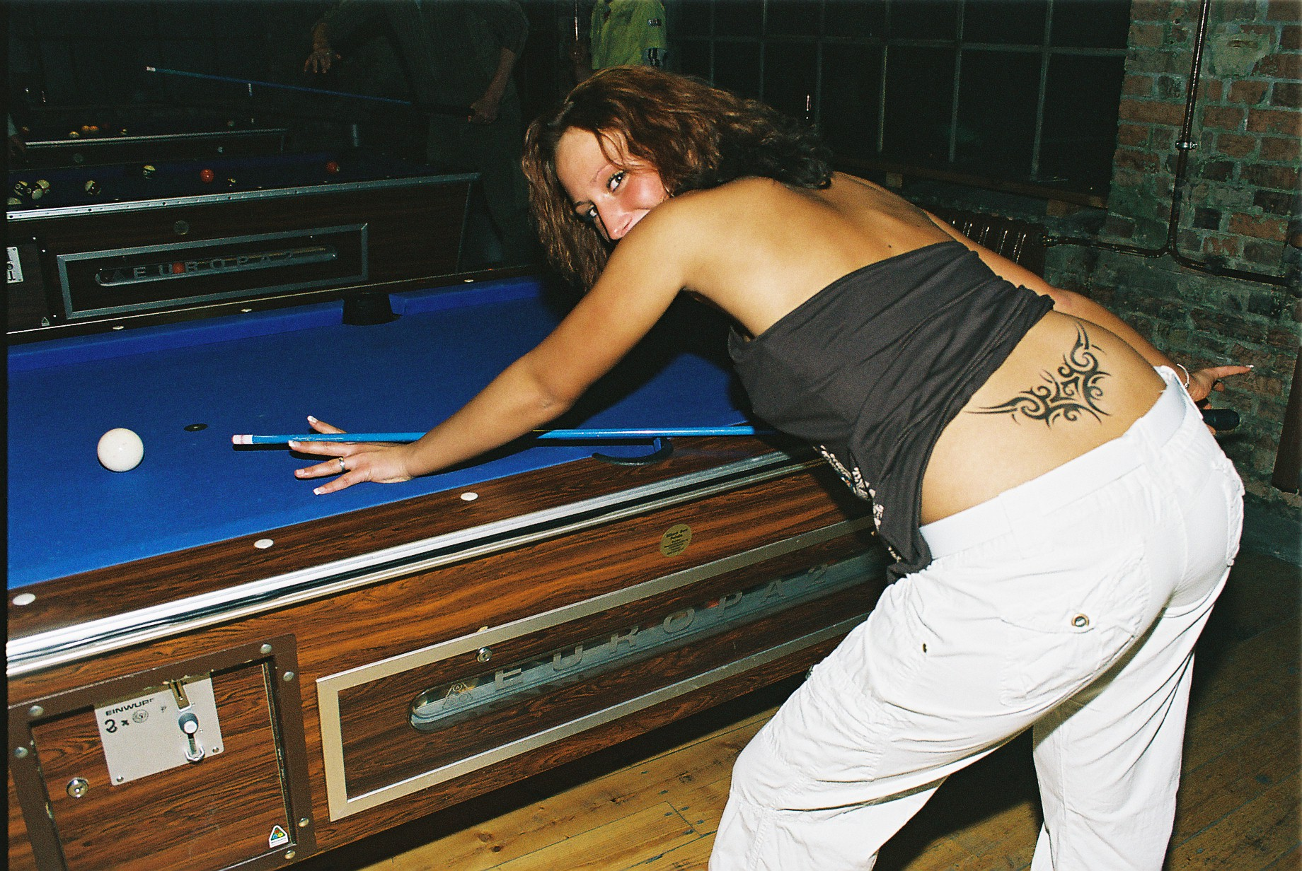 Miss Arschgeweih 2006 in Eberswalde, Discothek Awerk, Preisträgerin eines von der Fa. Jägermeister ausgerichteten lokalen Wettbewerbs in einer Diskothek in Eberswalde, die dargestellten Personen haben der Veröffentlichung zugestimmt und verzichtet auf das Recht am eigenen Bild gemäß § 22 Kunsturheberrechtsgesetz Kamera EXA Rheinmetall (Baujahr 1952) Fujicolor Superia Reala 100